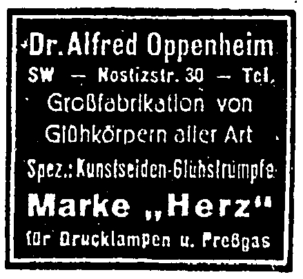 Kleinanzeige des Unternehmens Dr. Alfred Oppenheim aus dem Berliner Adressbuch 1931